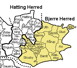 Bjerre Herred, Vejle Amt, Denmark